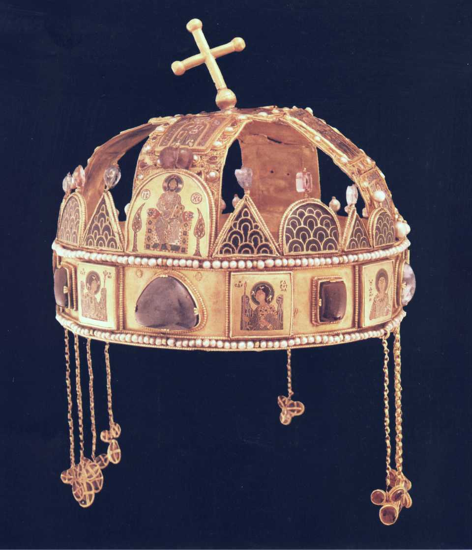 A Szent Korona előről.